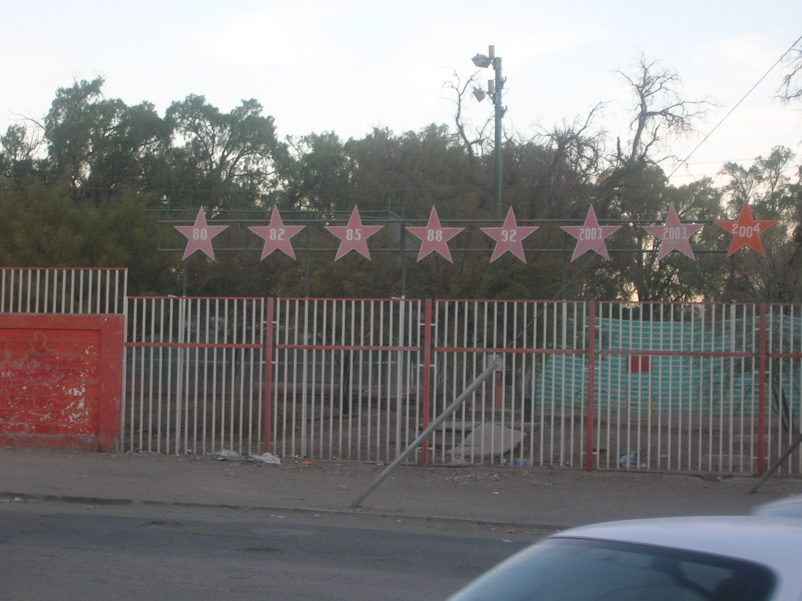 Puertas del Club de Campo Cobreloa.